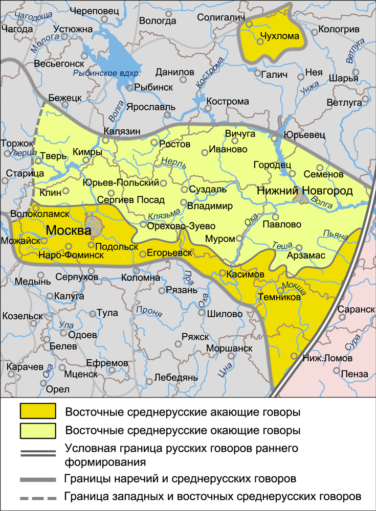 Карта восточных среднерусских aкающих говоров.Источники: Захарова К. Ф., Орлова В. Г. Диалектное членение русского языка — 2-е изд. — М.: Едиториал УРСС, 2004. — ISBN 5-354-00917-0, с. 141. Касаткин Л. Л. Русские диалекты. Лингвистическая география Русские. Монография Института этнологии и антропологии РАН — М.: Наука, 1999, с. 96. Федеральная целевая программа Русский язык. Региональный центр НИТ ПетрГУ